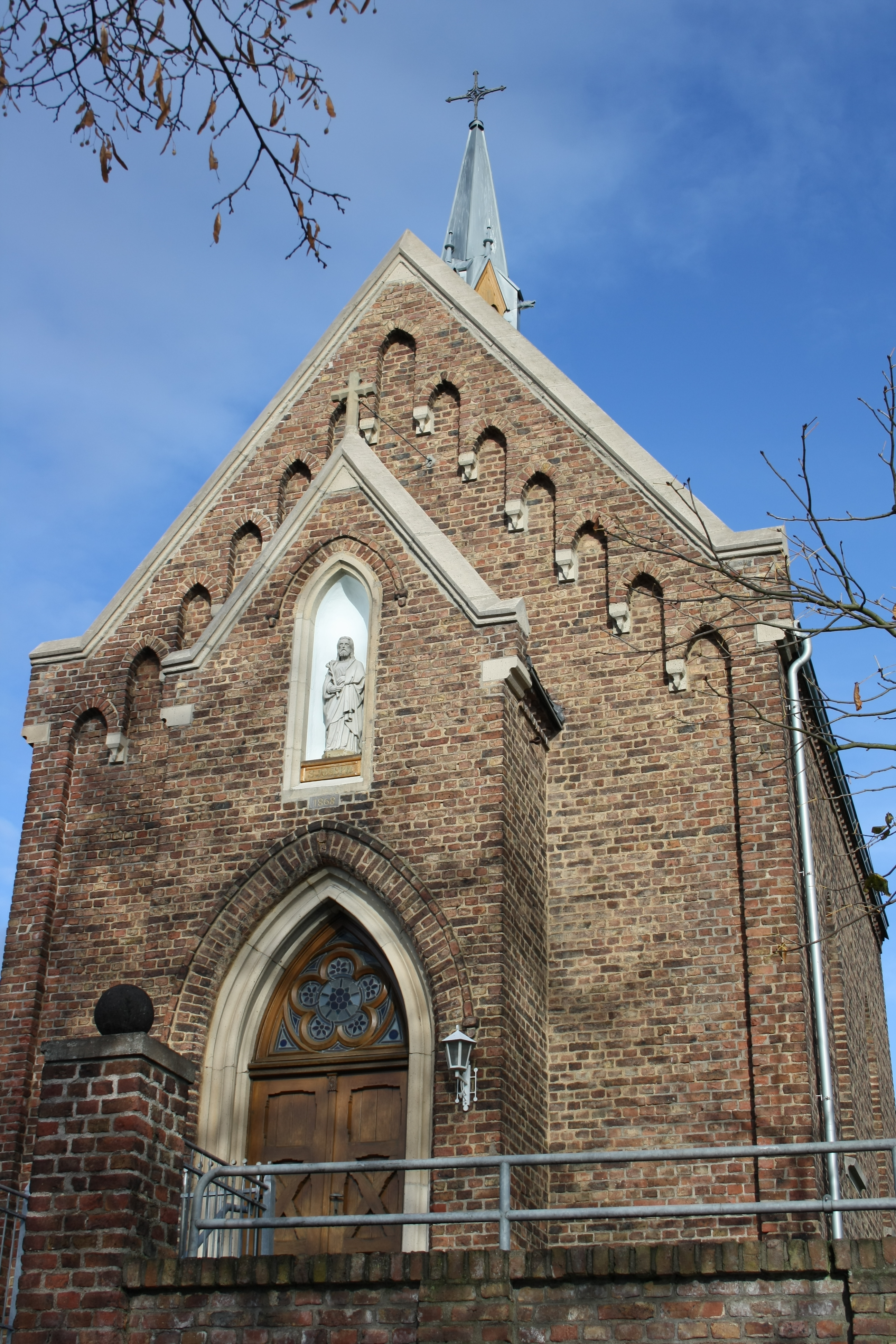 katholische Kapelle St. Joseph in Beller, Ortsbezirk von Grafschaft, Außenansicht, Backsteinsaalbau von 1869